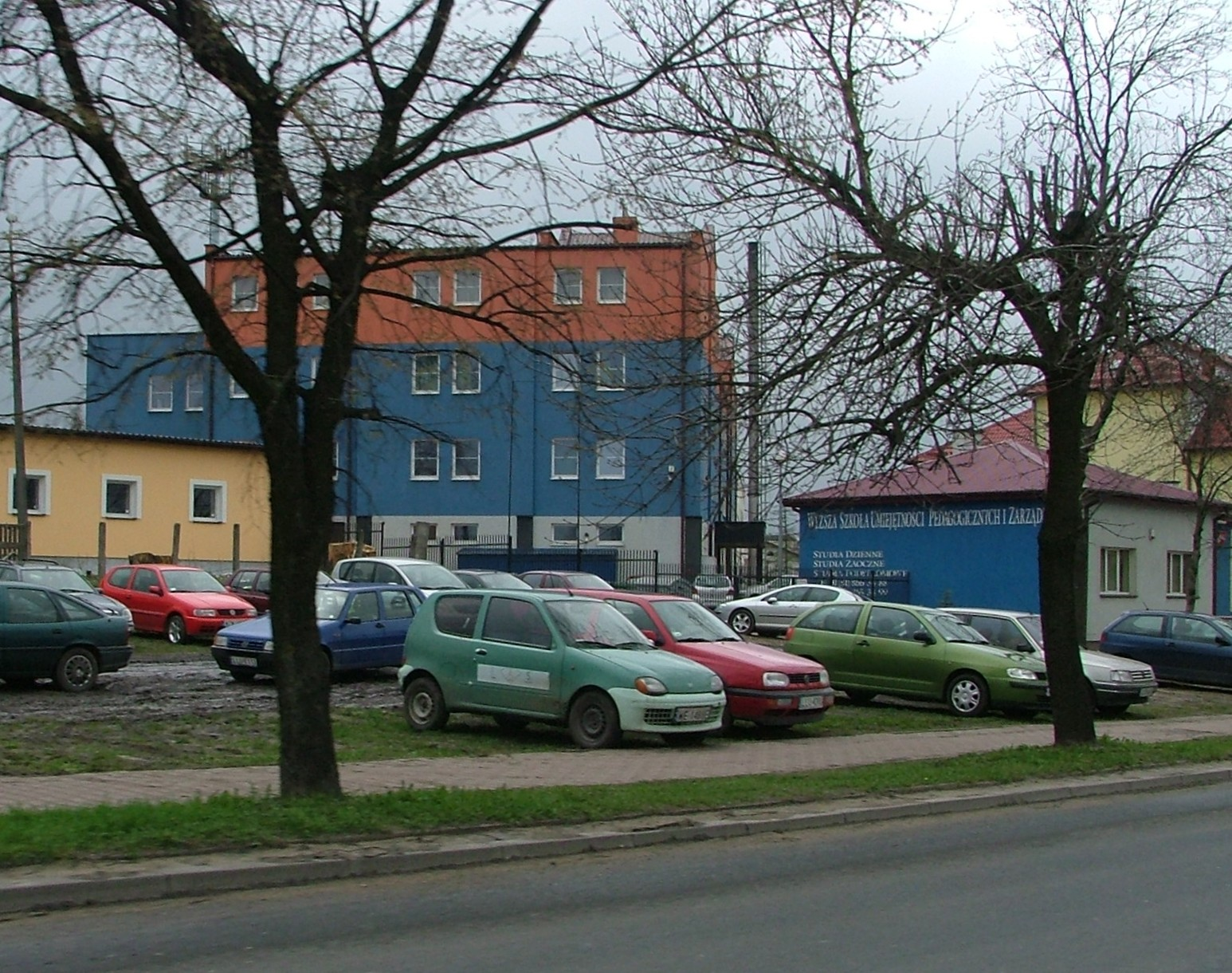 Ryki, woj. lubelskie, powiat rycki, Wyższa Szkoła Umiejętności Pedagogicznych i Zarządzania